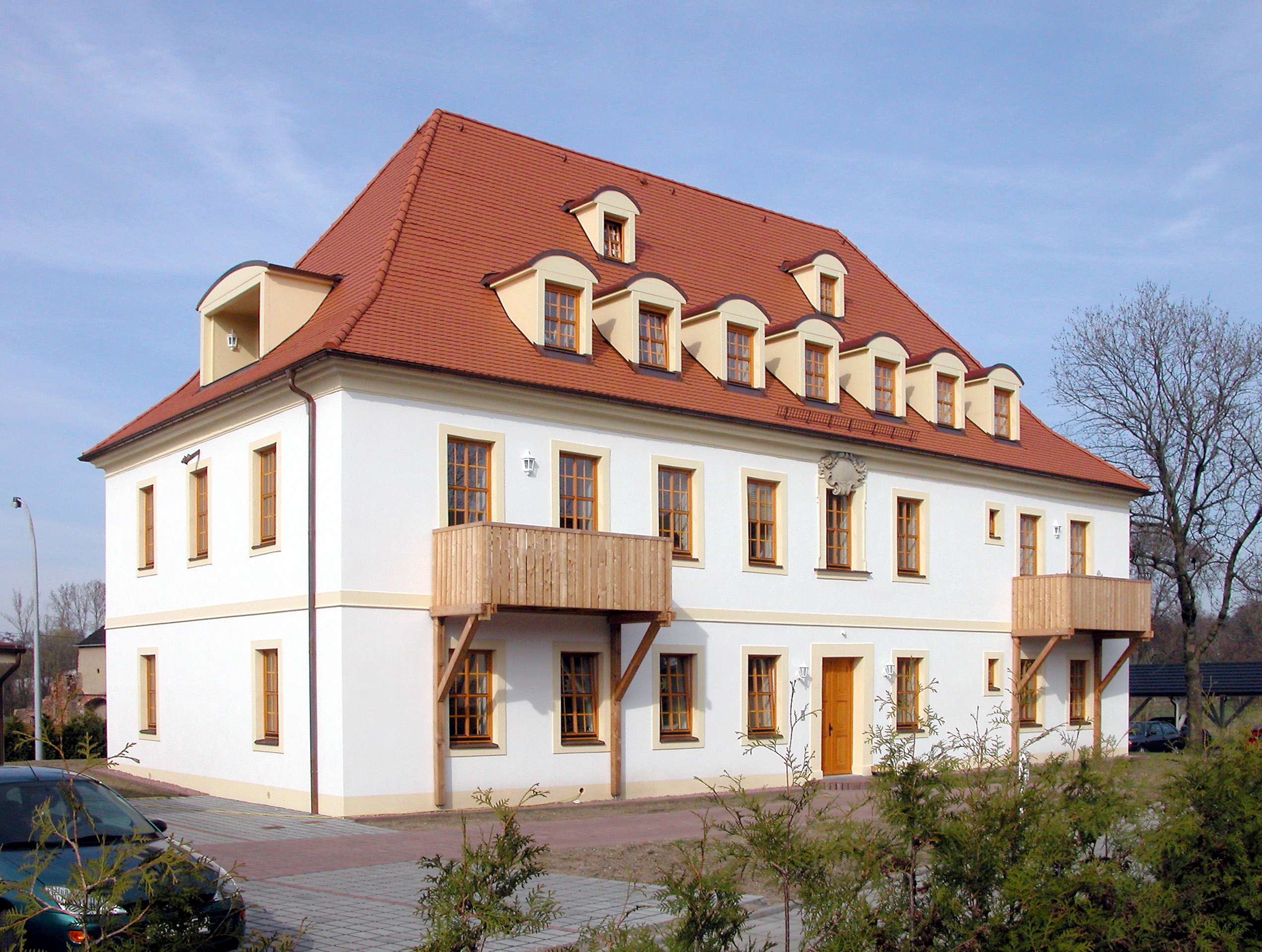 15.04.2006 01558 Zschieschen (Großenhain), Hermann-Zschoche-Straße 9F (GMP: 51.283701,51.283701): Herrenhaus. Das Rittergut Zschieschen am südlichen Rand Großenhains wurde erst 1631 aus kleinen Bauerngütern gebildet. Es hatte überwiegend bürgerliche Besitzer. Im frühen 18. Jahrhundert gehörte das Gut dem reichen Großenhainer Bürgermeister Bernhard Friedrich Hübotter. Er ließ um 1720 das Herrenhaus erbauen. Ende des 19. Jahrhunderts kaufte die Stadt Großenhain das Rittergut für Siedlungszwecke. Der Gutshof wurde durch die Stadt bewirtschaftet und in den 1930er Jahren verpachtet. Nach 1945 wurde der Hof zunächst als Volksgut bewirtschaftet und dann von der LPG in Priestewitz genutzt. Im Herrenhaus waren kleinere Wohnungen untergebracht. Seit 1990 stand der Gutshof leer. Das einstige Herrenhaus wurde 2004/05 frisch saniert. Balkone und Gaupen sind hinzugekommen. Inzwischen bewohnt. Südfassade. [DSCN9454.TIF]20060415115DR.JPG(c)Blobelt